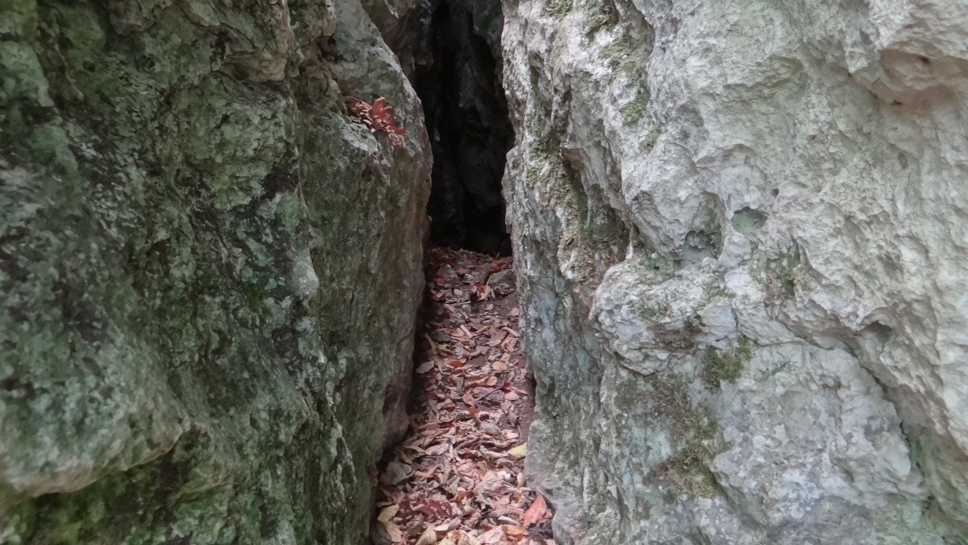 Jaskinia między Studniami na wzniesieniu Dudnik w Podlesicach